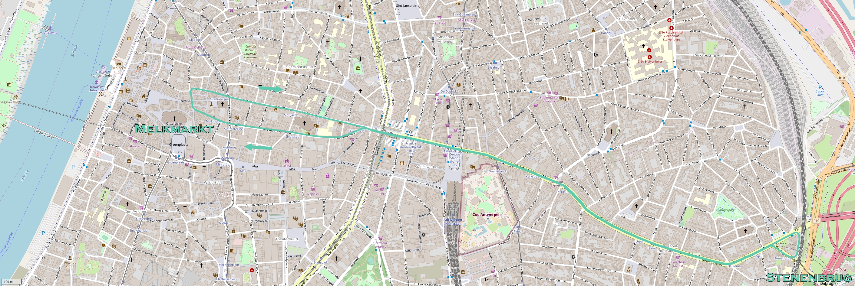 Tracé de la ligne 24 du tramway d'Anvers entre Stenenbrug et Melkmarkt, en usage entre le 3 avril et le 21 décembre 2018 This map may be incomplete, and may contain errors. Don't rely solely on it for navigation.